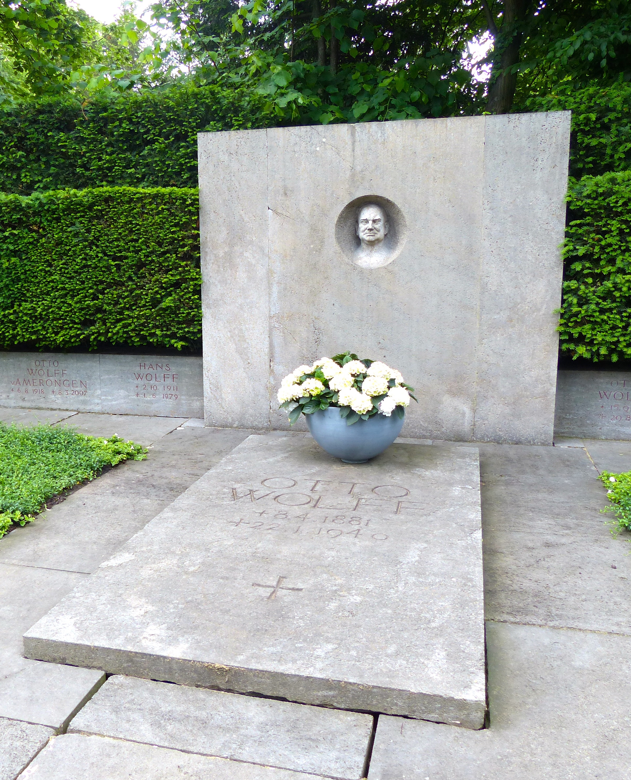 Grabstelle auf dem Melaten-Friedhof: Otto Wolff (* 8. April 1881 in Bonn; † 22. Januar 1940 in Berlin) war ein deutscher Großindustrieller.